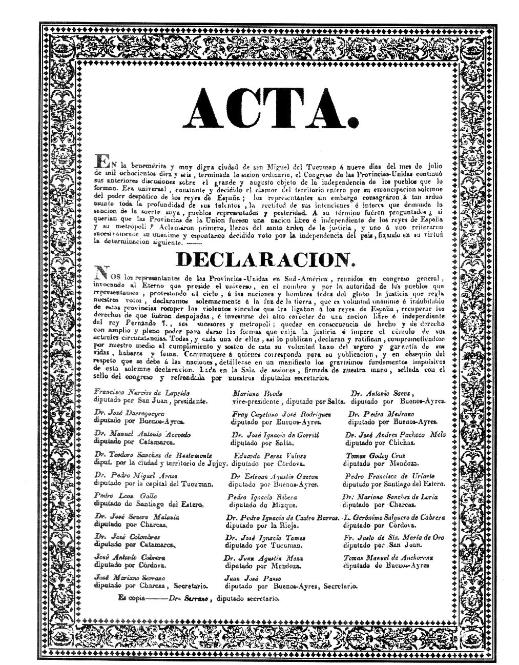 Acta de Independencia de las Provincias Unidas en Sud-América (República Argentina)